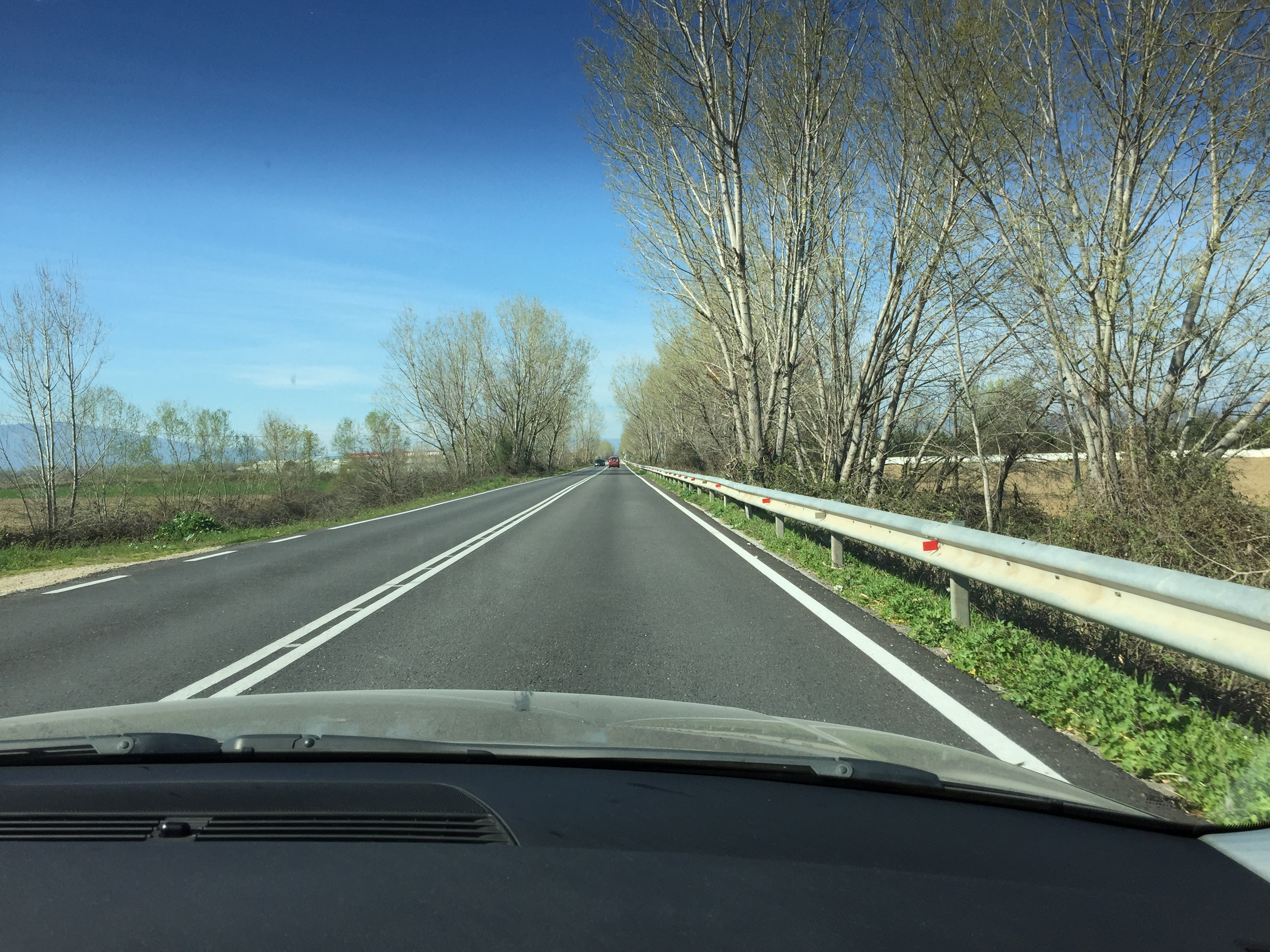 Άποψη του τμήματος Καρδίτσα-Τρίκαλα της Εθνικής Οδού 30